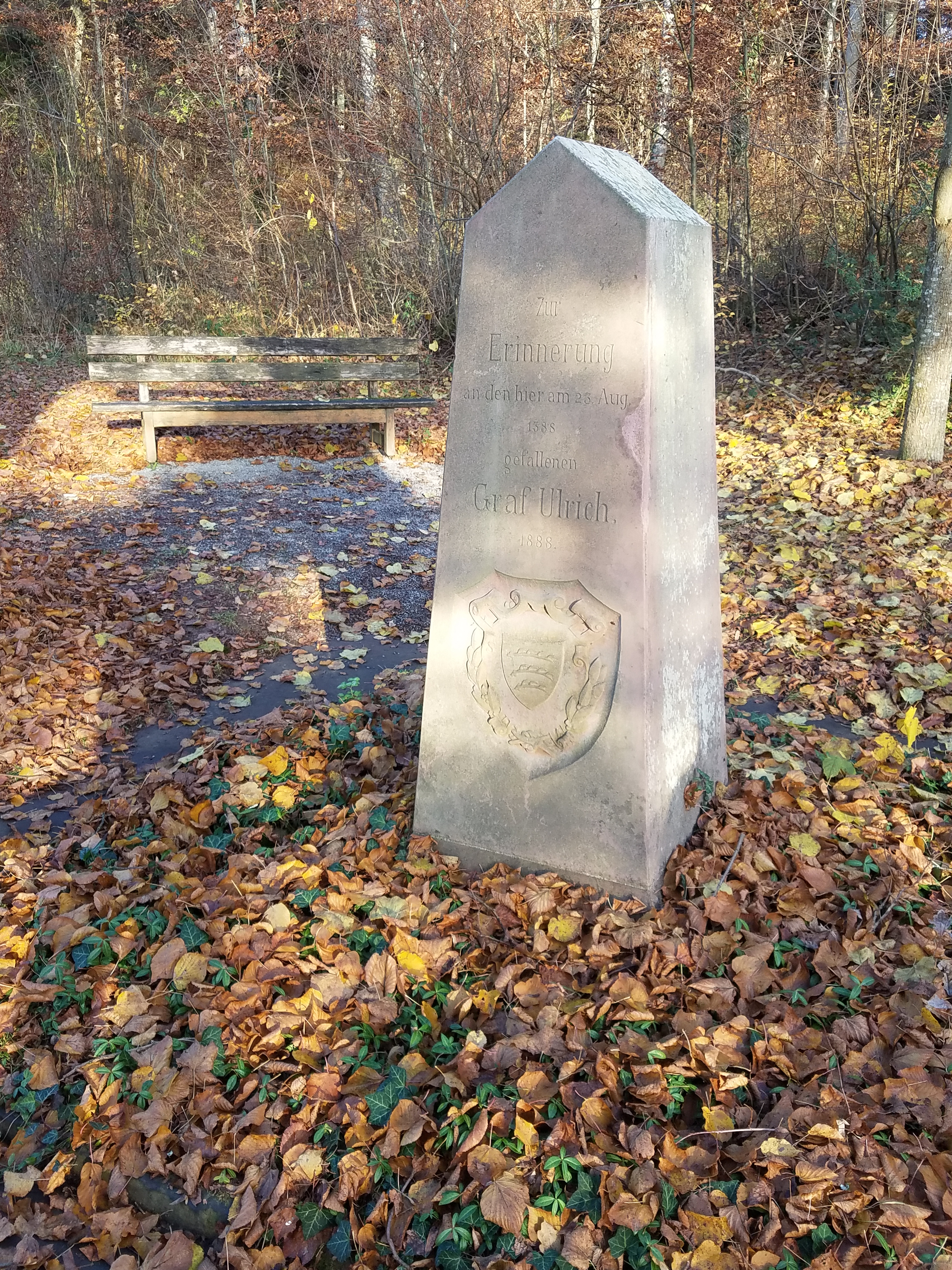 Ansicht des Gedenksteins Ulrichstein nach Entfernung des Zaunes